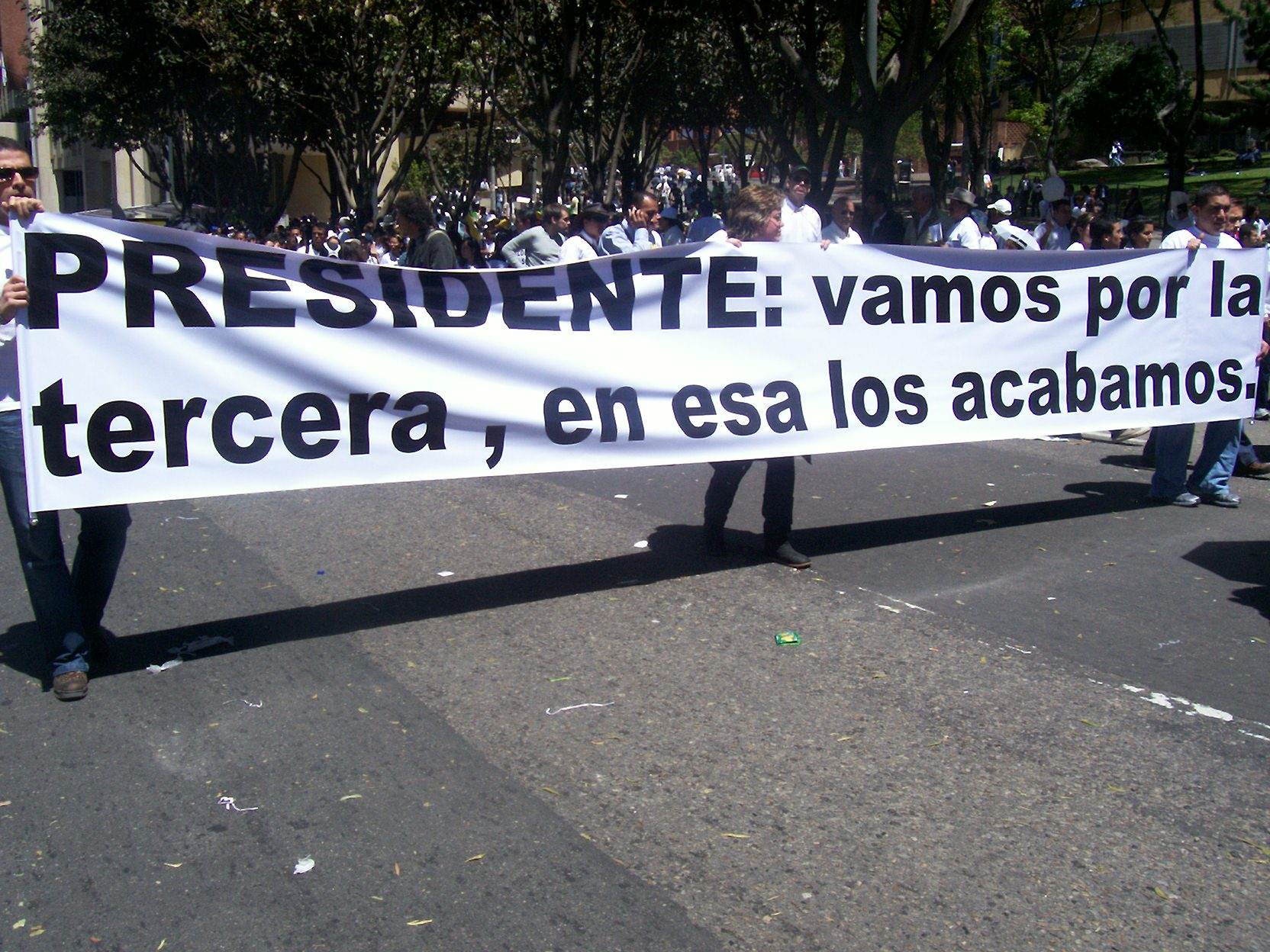 Cartel a favor de la 2a reelección de uribe en el 4 febero 2008